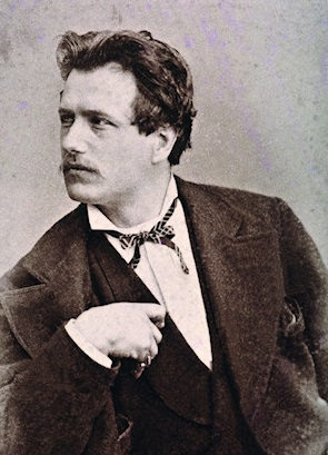 Eugenio Prati